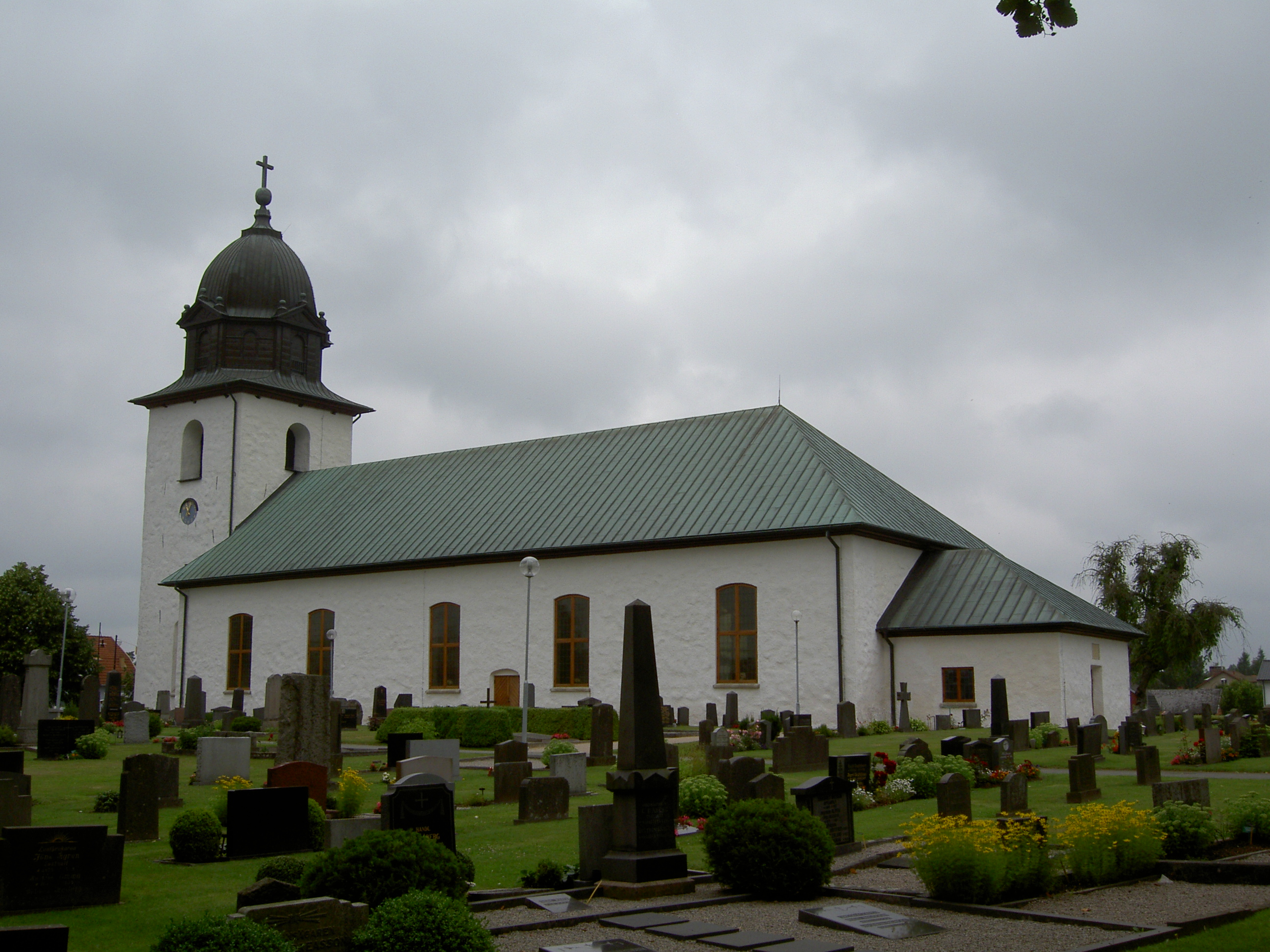 Örkeneds kyrka